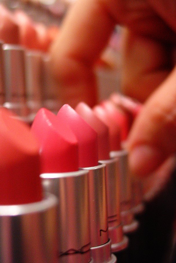 Lipstick